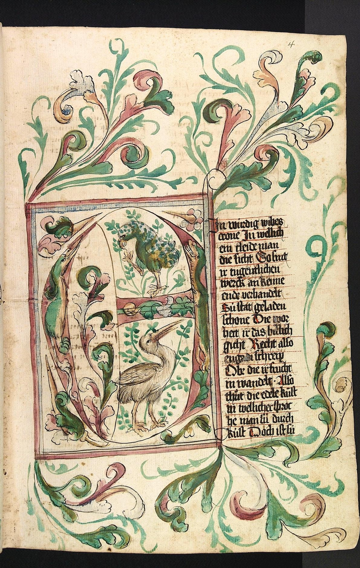 Codex Palatinus germanicus 300, "Konrad von Megenberg: Das Buch der Natur, Prolog", Blatt 4r der Handschrift (E-Initiale mit 2 Vögeln zum Prolog).